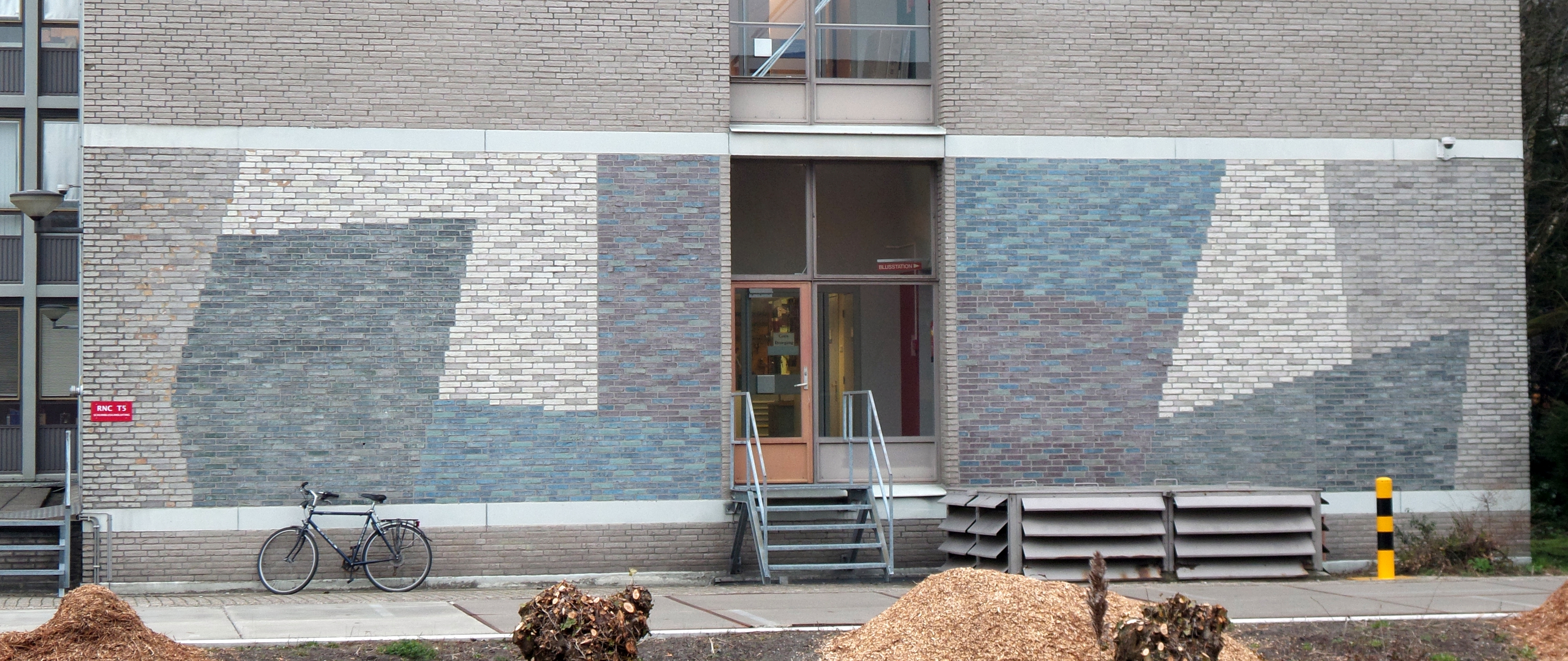 Reliëfs van geglazuurde baksteen van Johan Haanstra aan de muren van de VU in Amsterdam. Deze liggen normaal verscholen achter het groen. Deze fotos zijn genomen na het snoeiwerk van bomen.